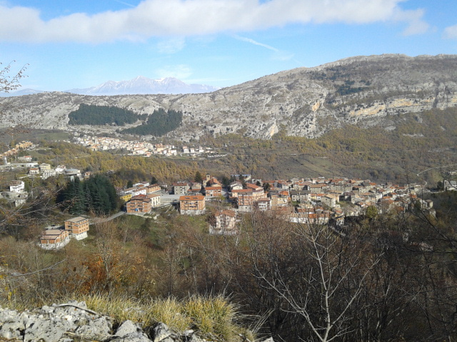 Panoramica di Cappadocia (Abruzzo)